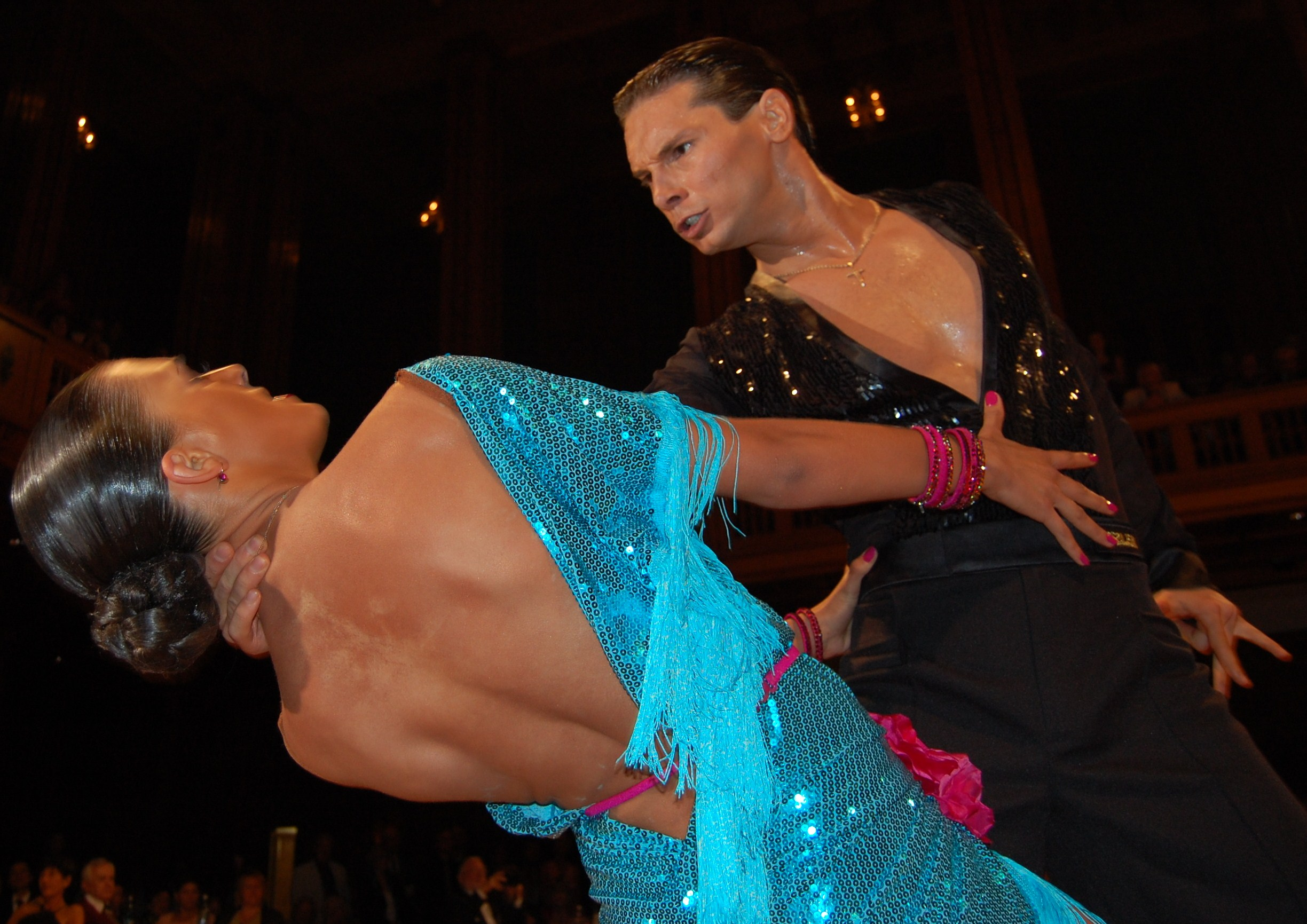 Marius Iepure und Christina Kessler vom TSC Rot-Gold Casino Nürnberg, deutsche Amateur-Tanzsportler in Lateinamerikanischen Tänzen